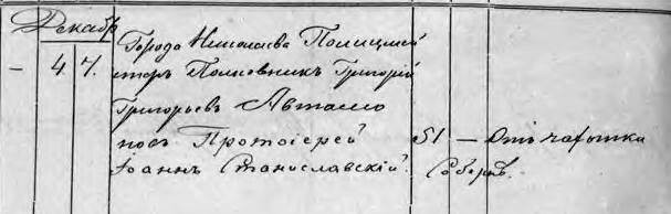 Из метрической книги запись о смерти полицмейстера